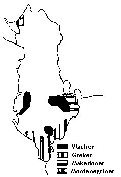 skapad av användare L'Houngan